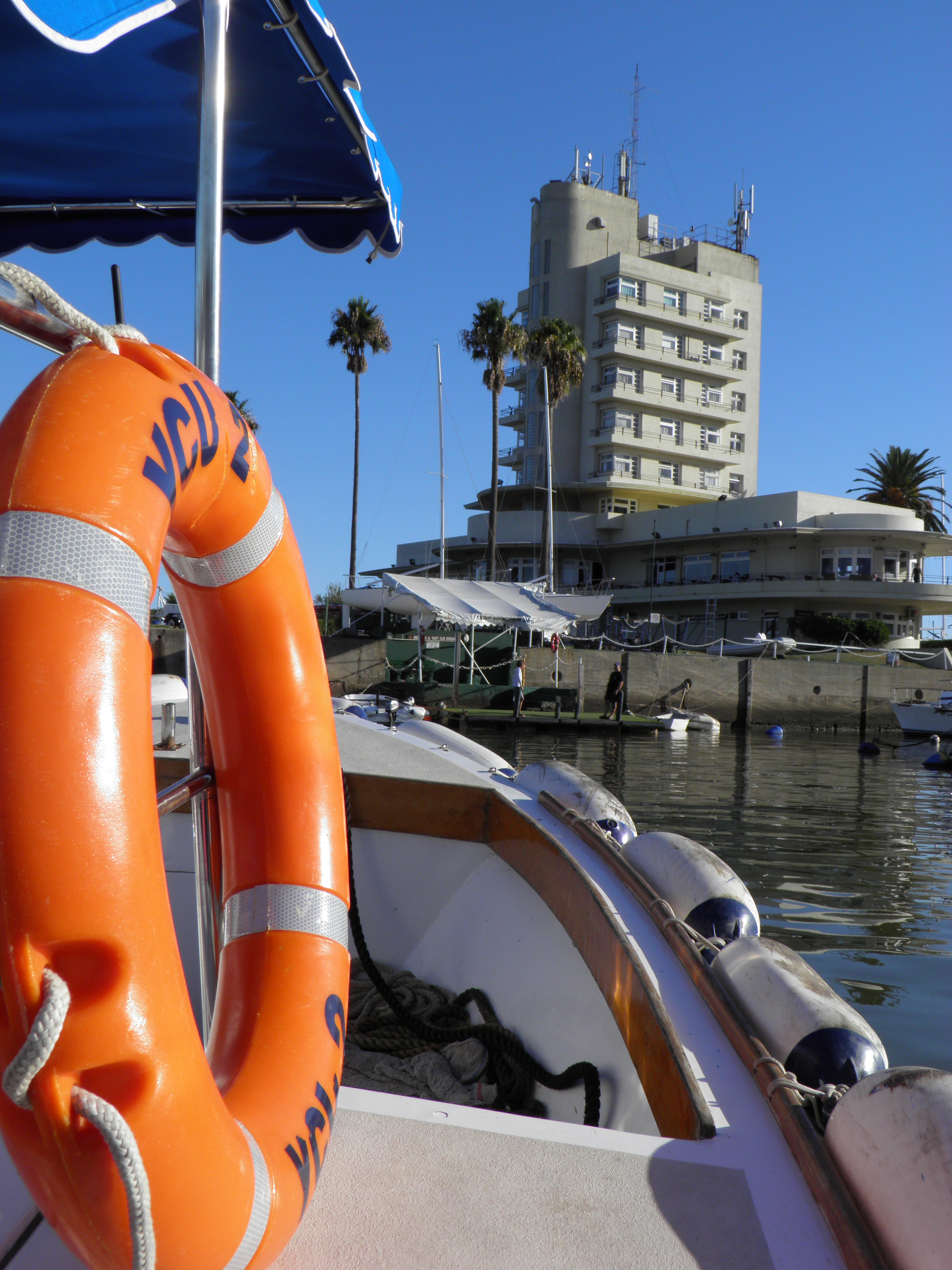 El edificio del Yacht Club desde la lancha de embarque. Ubicado en el departamento de Montevideo